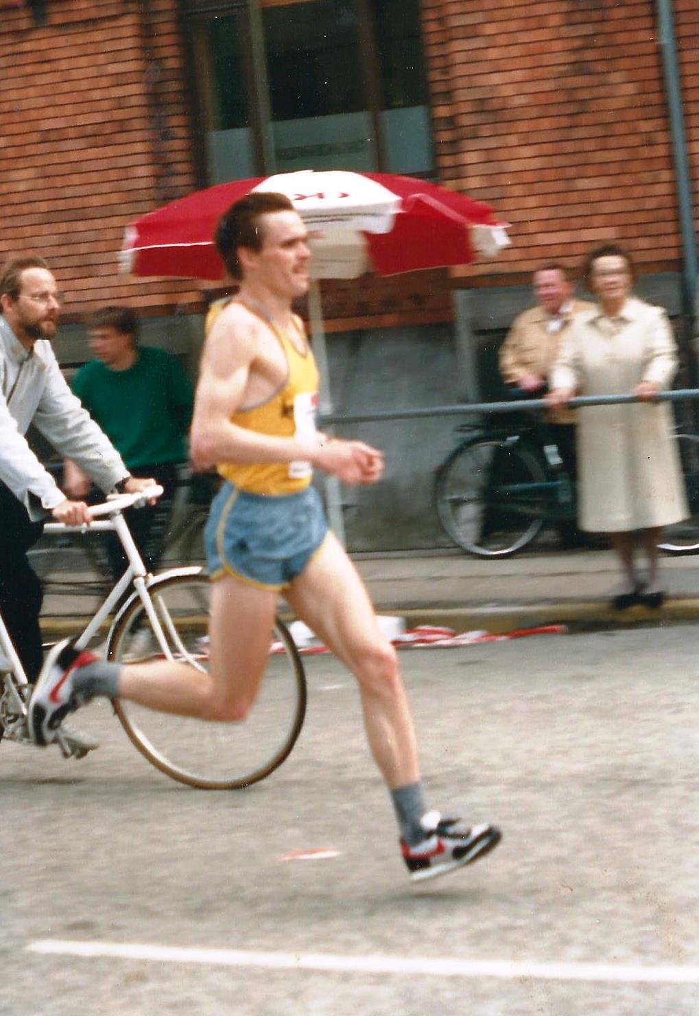 A.Malicki podczas maratonu w Kopenhadze, 1986 r.